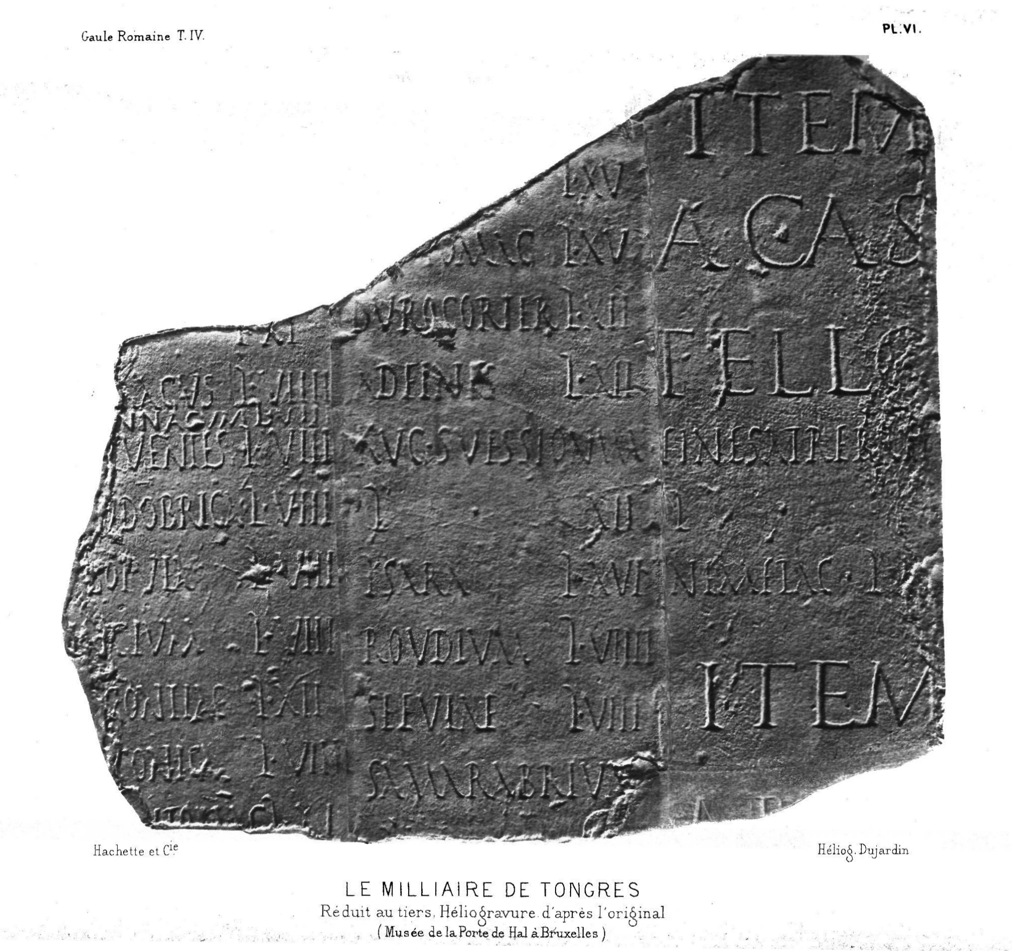 Desjardins, Le milliaire de Tongres : héliogravure d'un estampage original, 1893